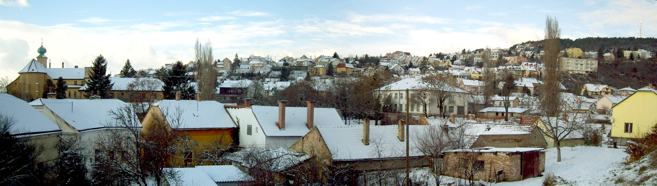 Pécs, Mecsek, Hungary / Pécsi hegyoldal télen, Magyarország